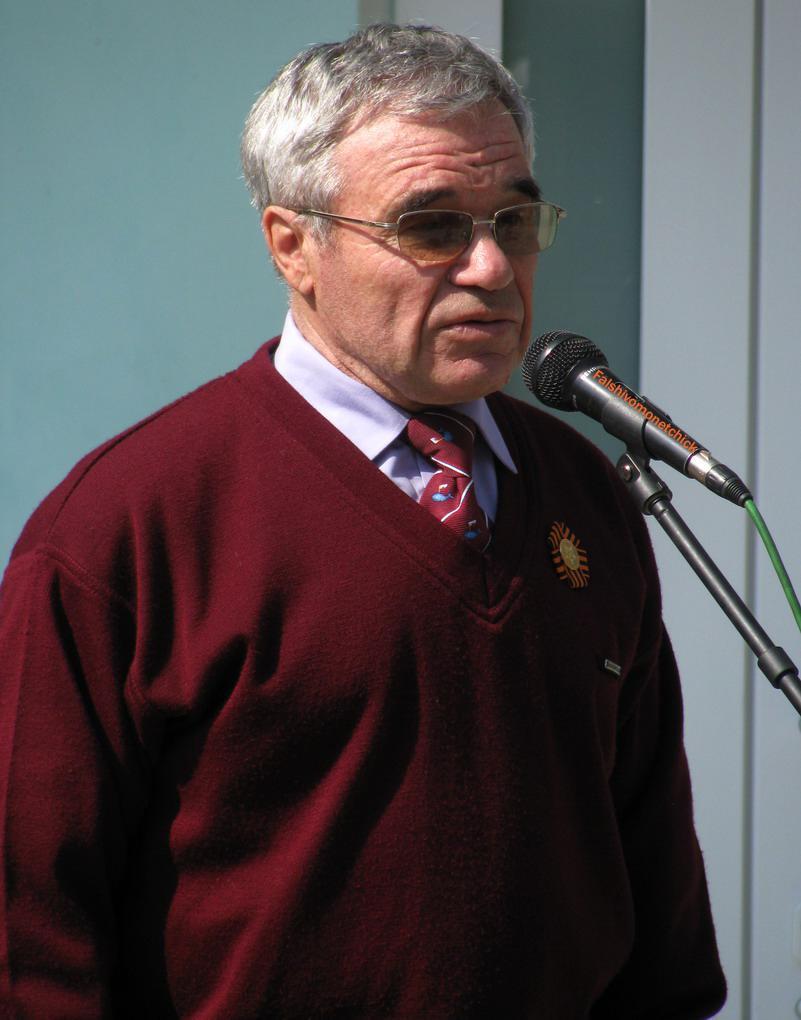 Легендарный хоккеист СКА_Свердловск Николай Александрович Дураков